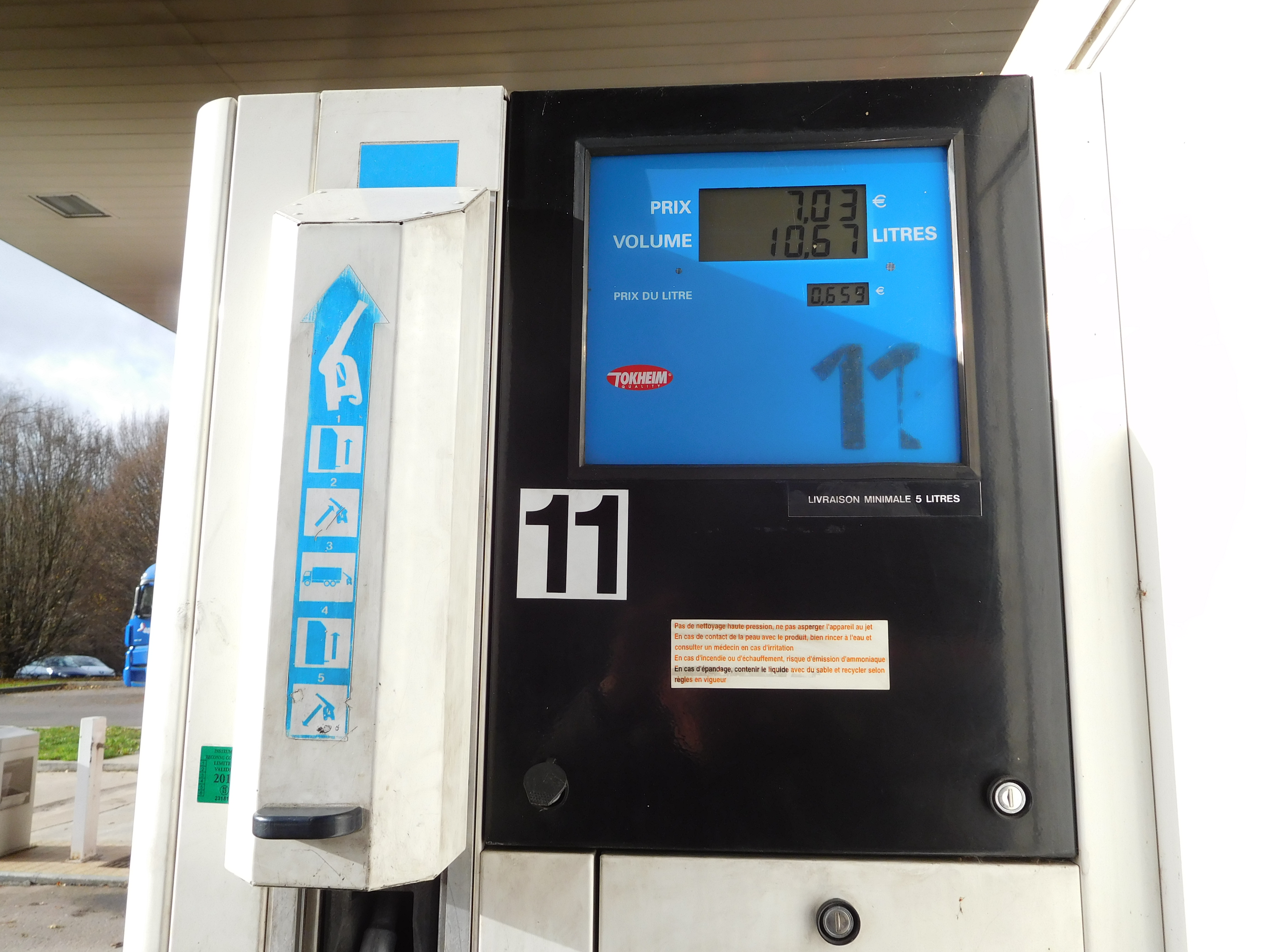 Distributeur Tokheim d'AdBlue (prix : 0,659 €/L) d'une station-service Esso de l'autoroute A20 ; aire de service de Beaune-les-Mines, près de Limoges, France.